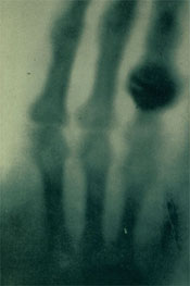 dora e gruas